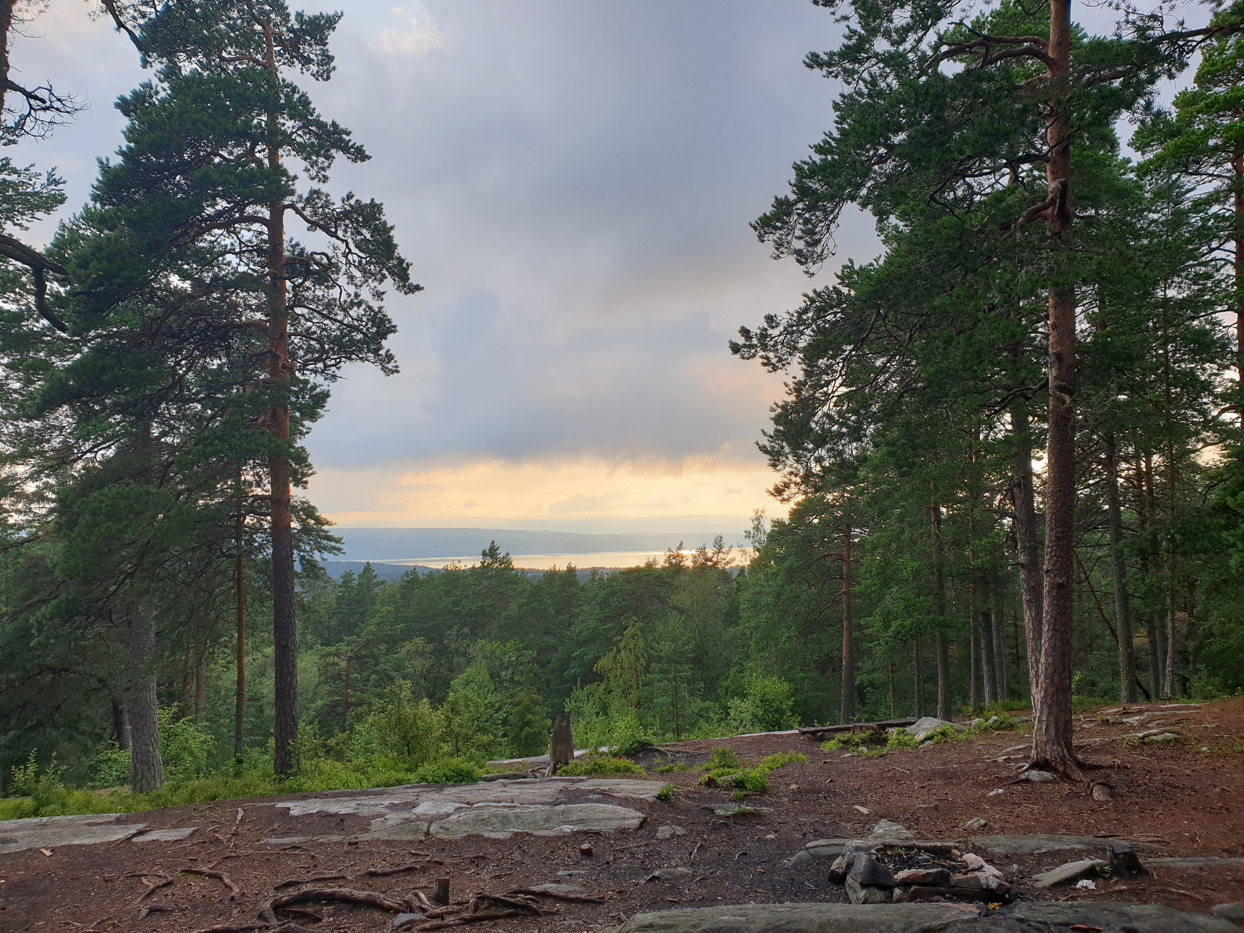 Grønliåsen ved kommunegrensa mellom Oslo og Akershus i sør. Utsikt mot vest.